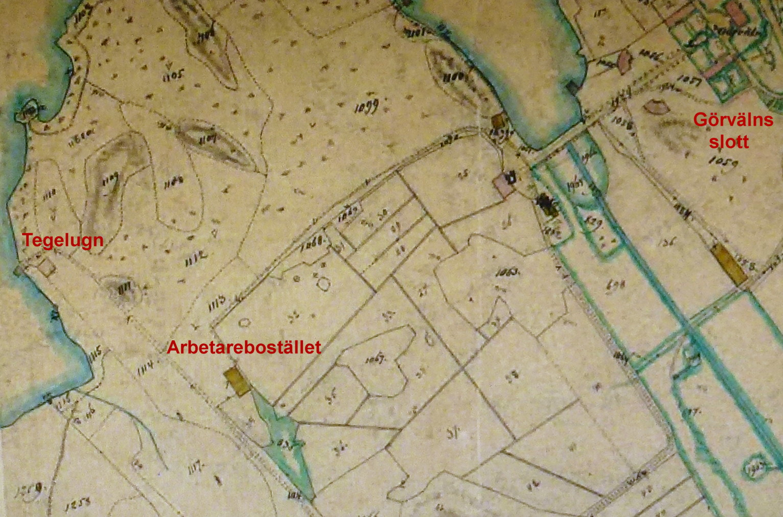 Ägoutbyte, Gränsbestämning 1866, Görvälns tegelbruk och Görvälns slott